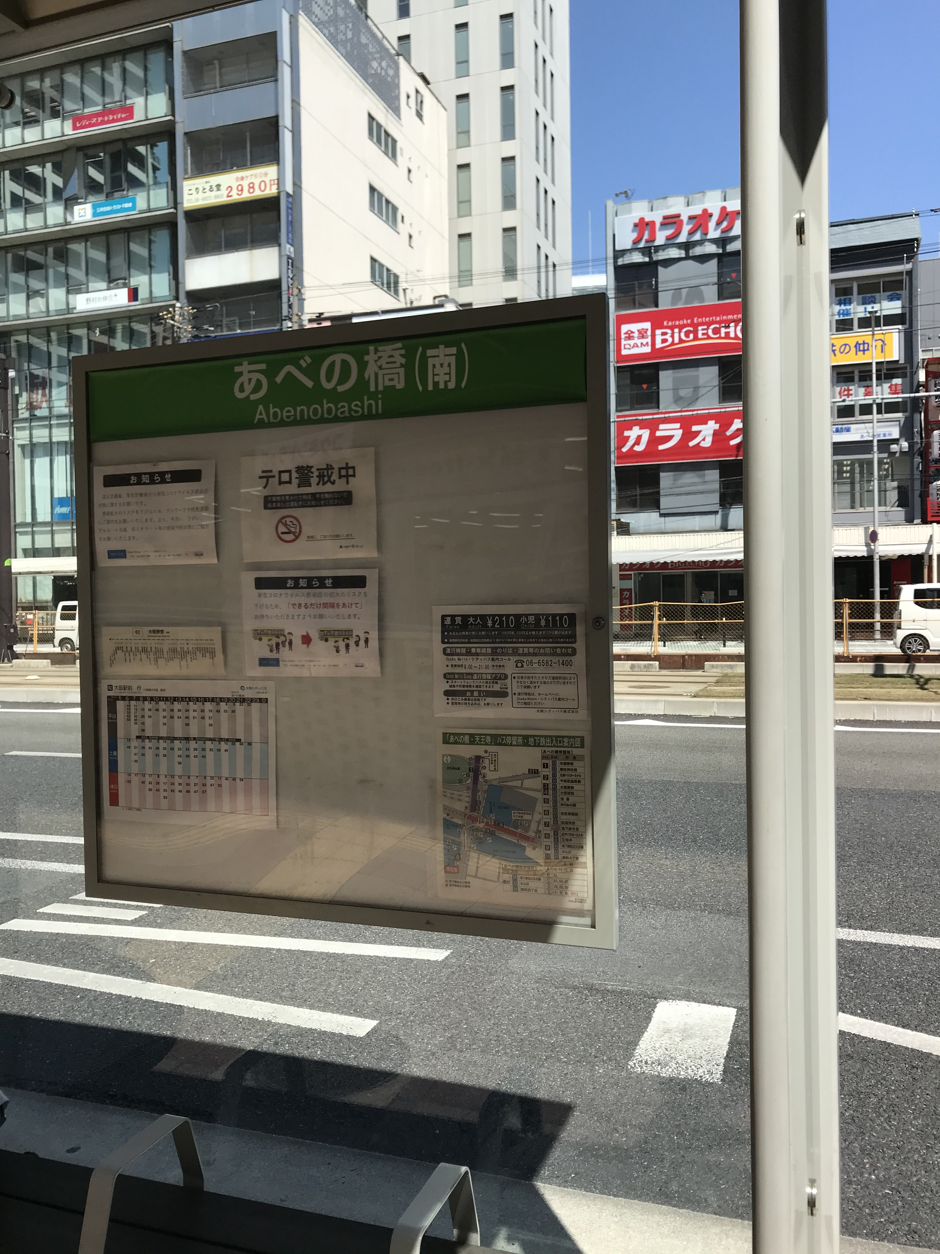 名称が変更された62号系統の乗り場